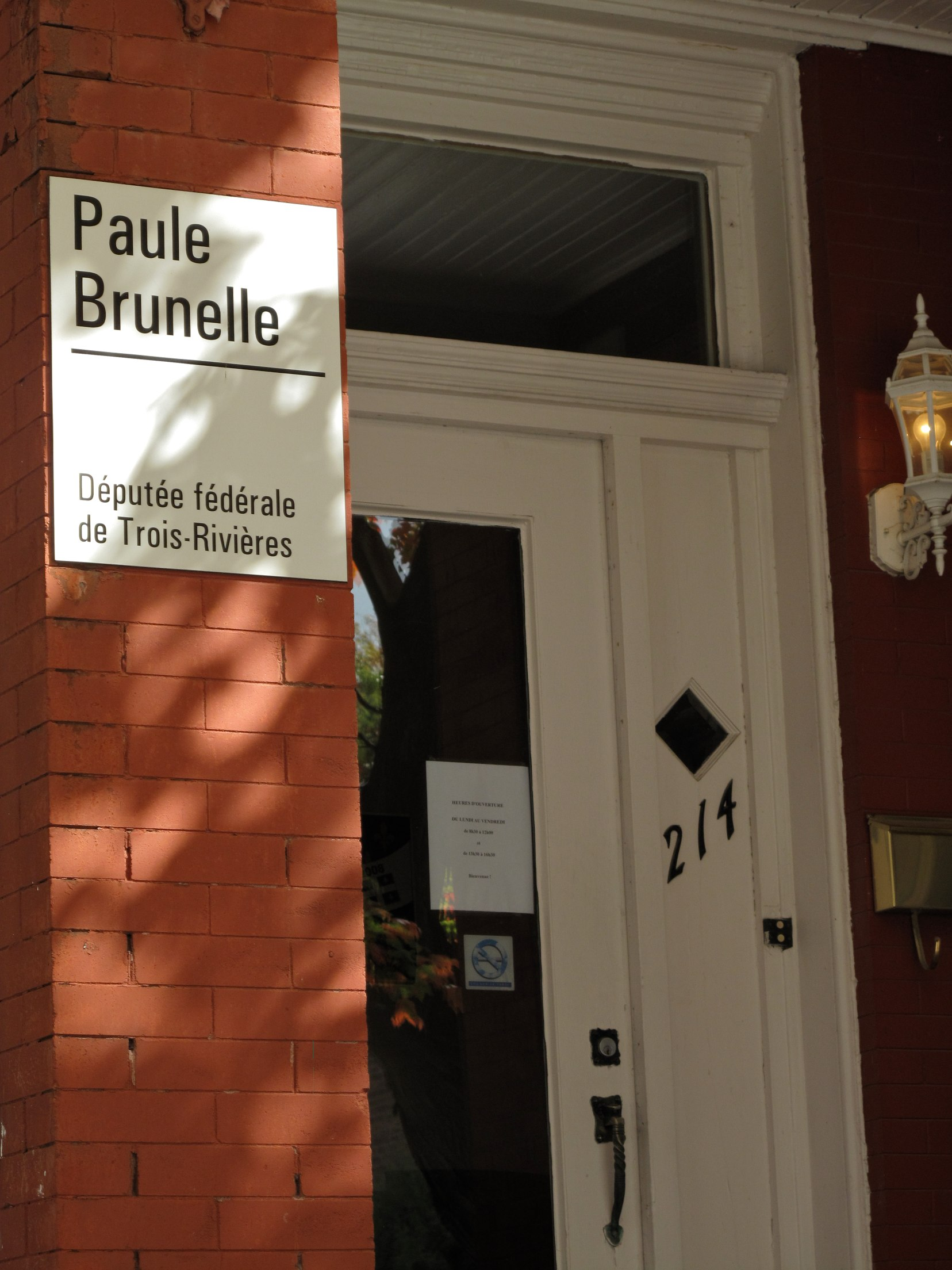 séjour octobre 2010